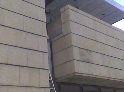 חיפוי מעקה על גג בקונסוליה האמריקאית. בוצע על ידי חברת "גני ירושלים"